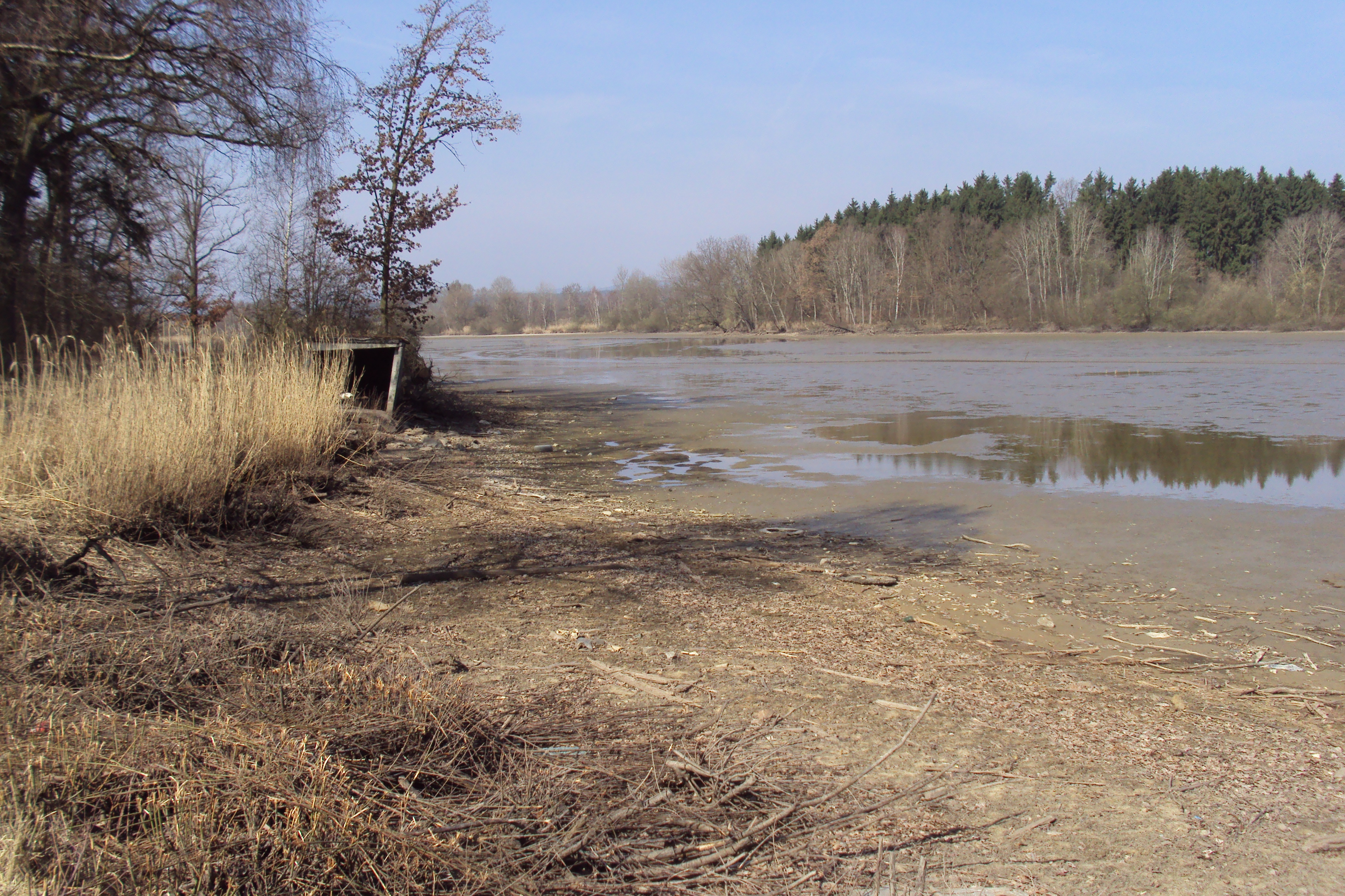 Rybník je u silnice Holany-Zahrádky, katastr Zahrádky 790273